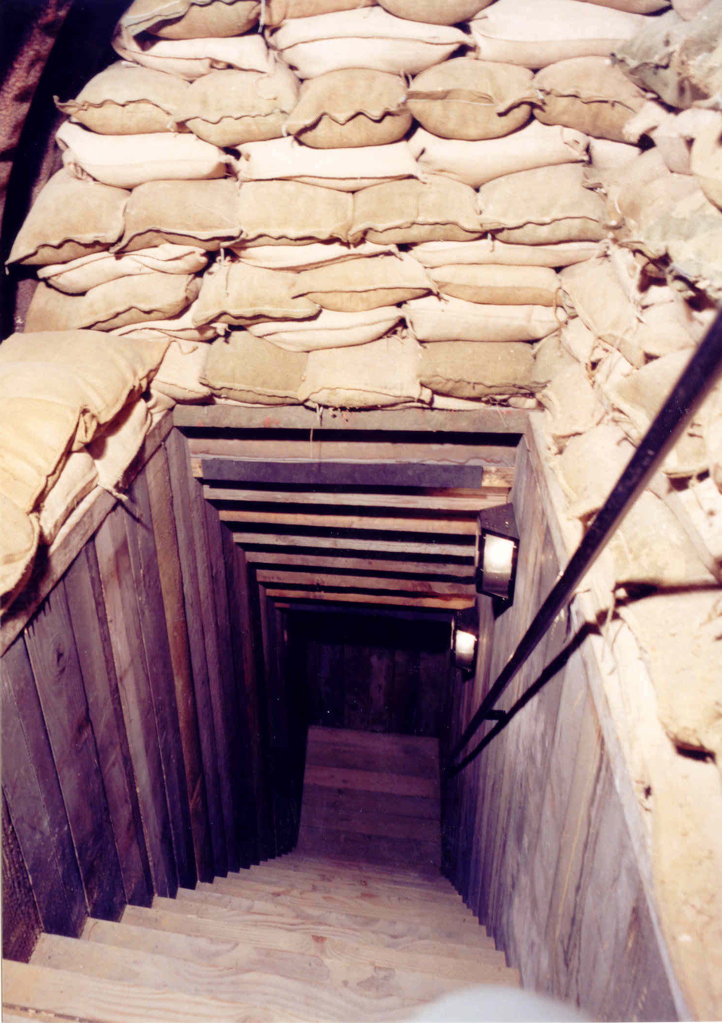 de start van de dugout